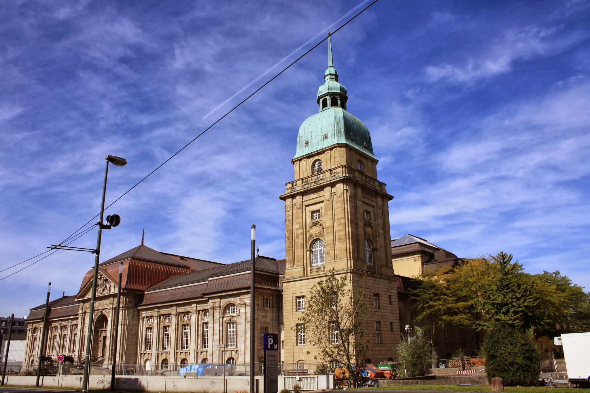 Darmstadt-Mitte, Darmstadt, Germany